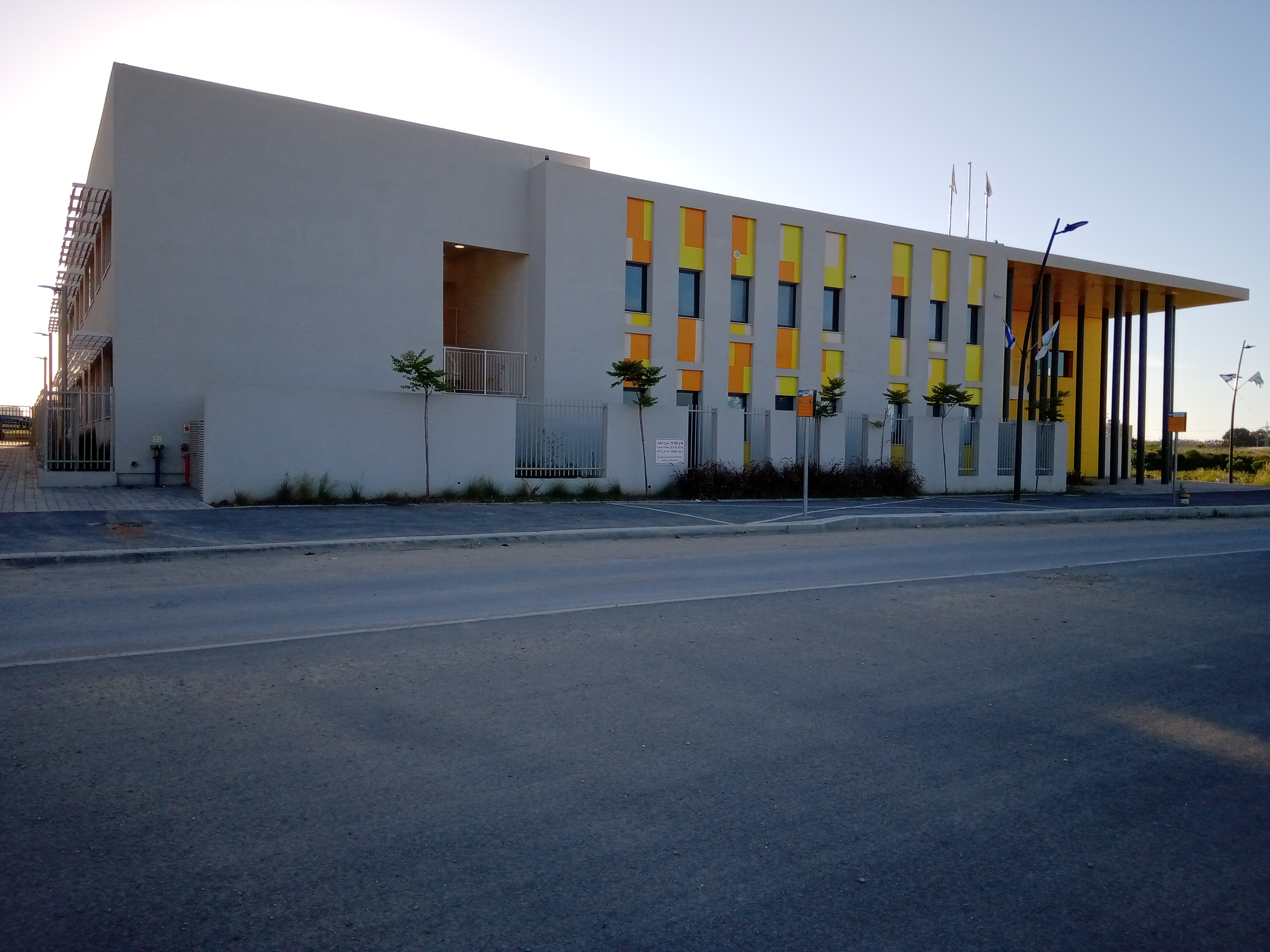 בית ספר מיתרים, נאות אפק